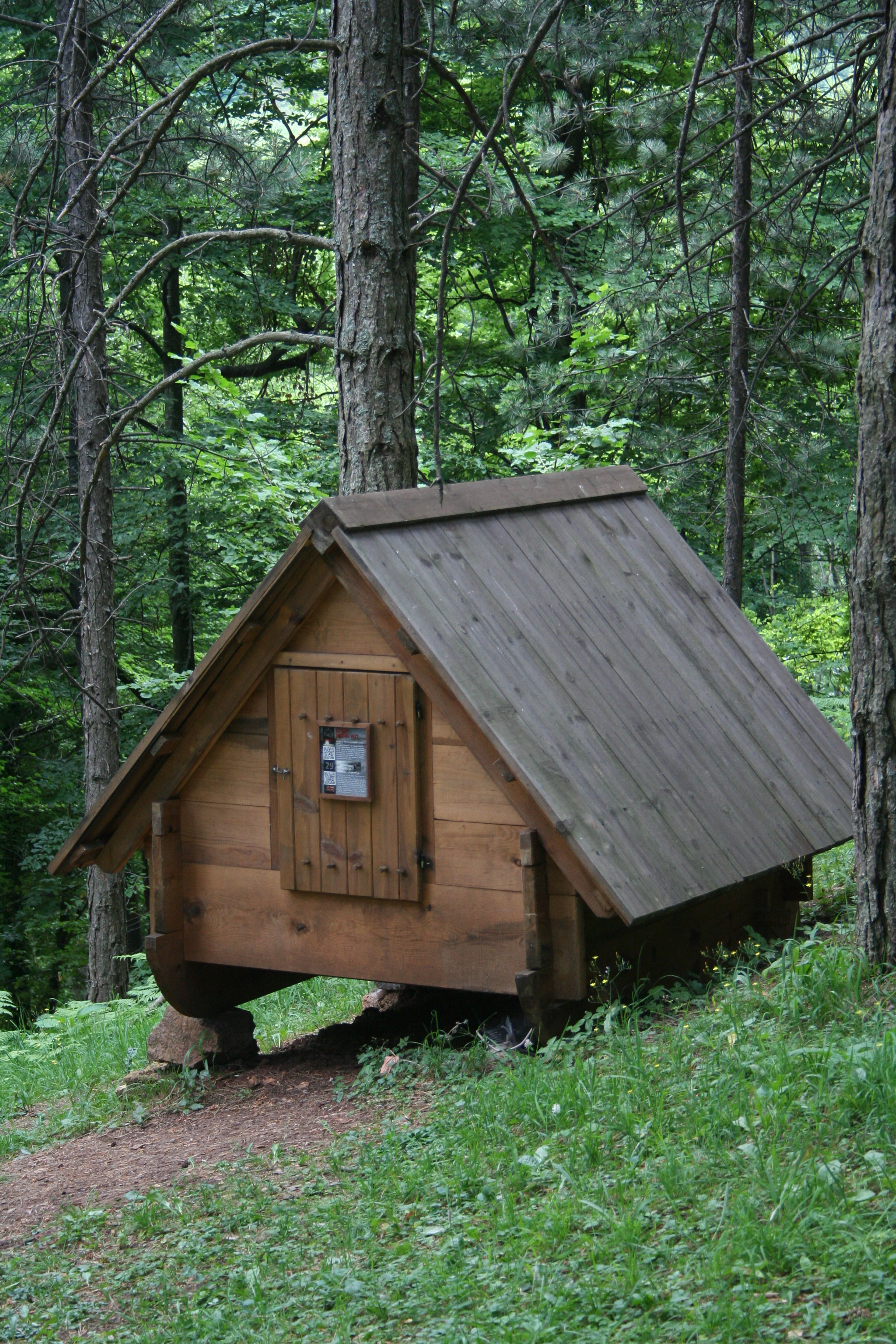 Muzej "Staro selo" Sirogojno